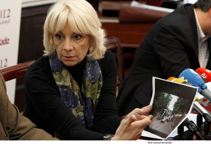 La alcaldesa de Cádiz (PP) en el ayuntamiento